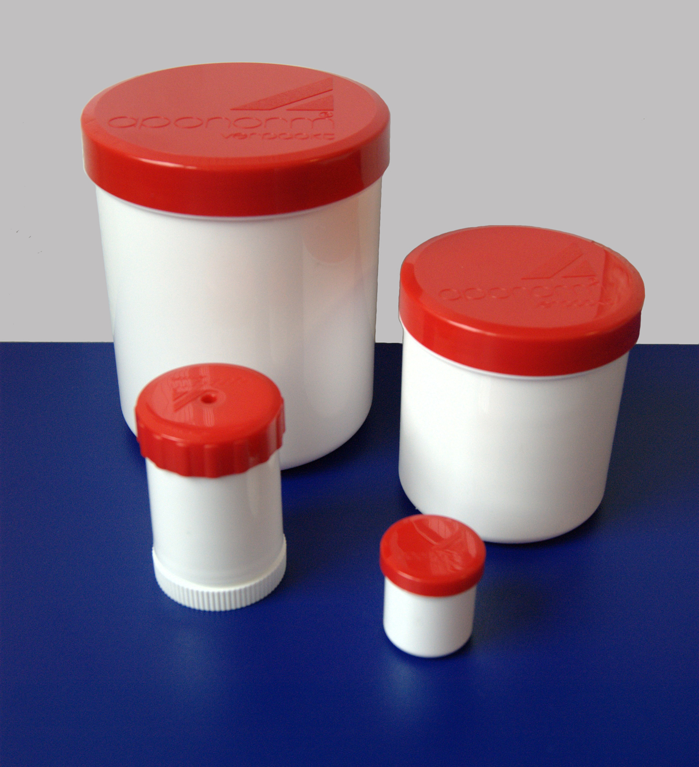 diverse Kruken